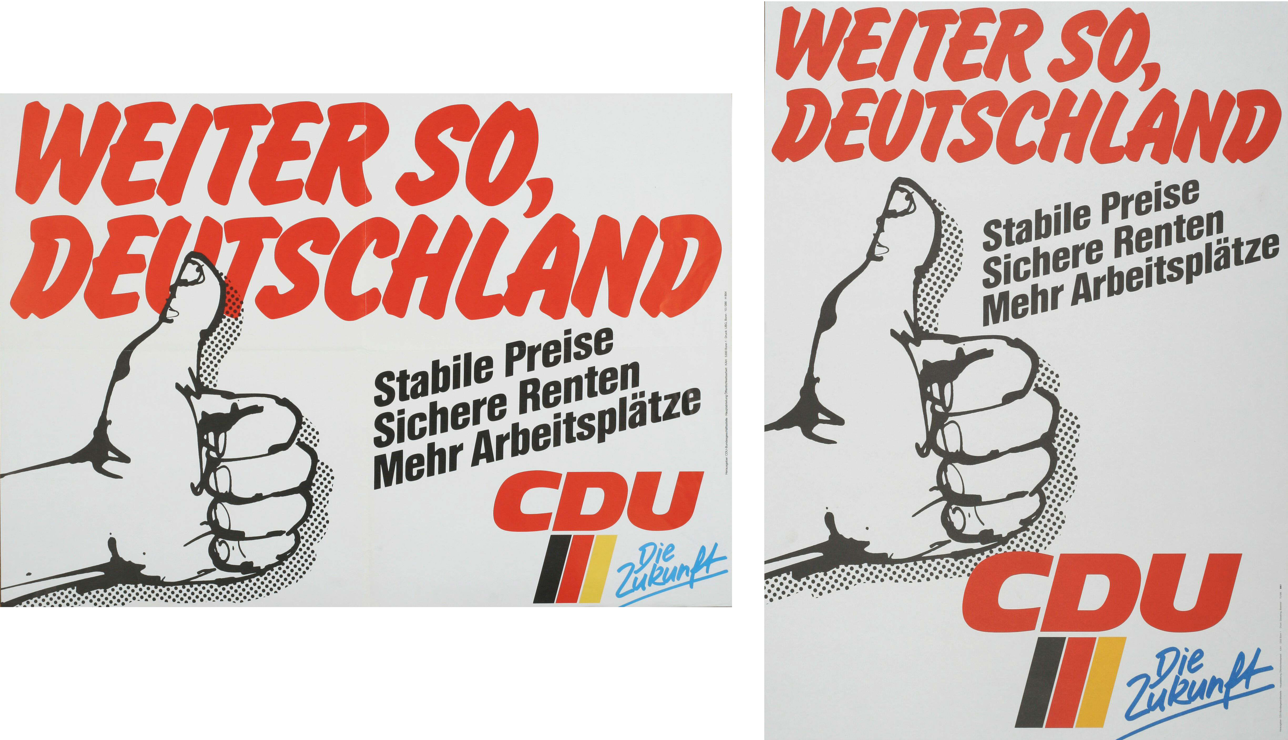 Weiter so, Deutschland Stabile Preise Sichere Renten Mehr Arbeitsplätze CDU Die Zukunft Abbildung: Erhobener Daumen Kommentar: s. dazu auch Plakat Nr. 3406, 3495 und 3496 Plakatart: Motiv-/Textplakat Auftraggeber: CDU-Bundesgeschäftsstelle, Hauptabteilung Öffentlichkeitsarbeit, Konrad-Adenauer-Haus, Bonn Drucker_Druckart_Druckort: Gieseking, Bielefeld UBG, Bonn Objekt-Signatur: 10-001: 2913 Bestand: Plakate zu Bundestagswahlen (10-001) GliederungBestand10-18: Plakate zu Bundestagswahlen (10-001) » Die 11. Bundestagswahl am 25. Januar 1987 » Motivplakate Lizenz: KAS/ACDP 10-001: 2913 CC-BY-SA 3.0 DE